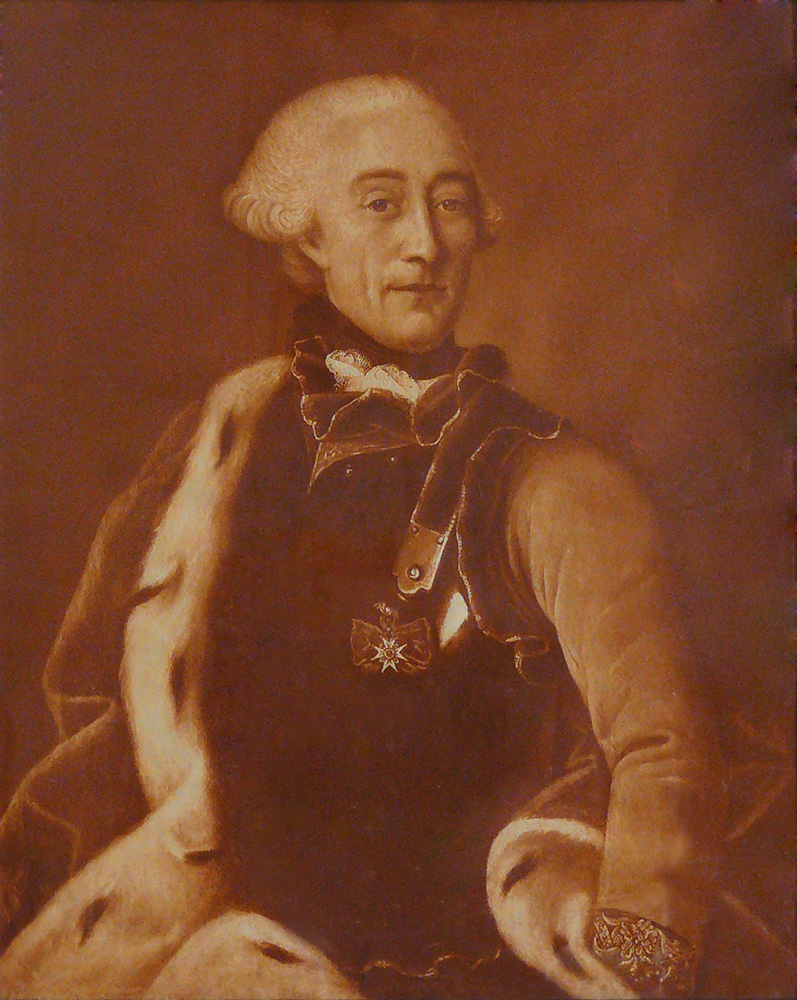 Gravure du XVIIIème siècle représentant le chevalier Gabriel-Charles de Solages.